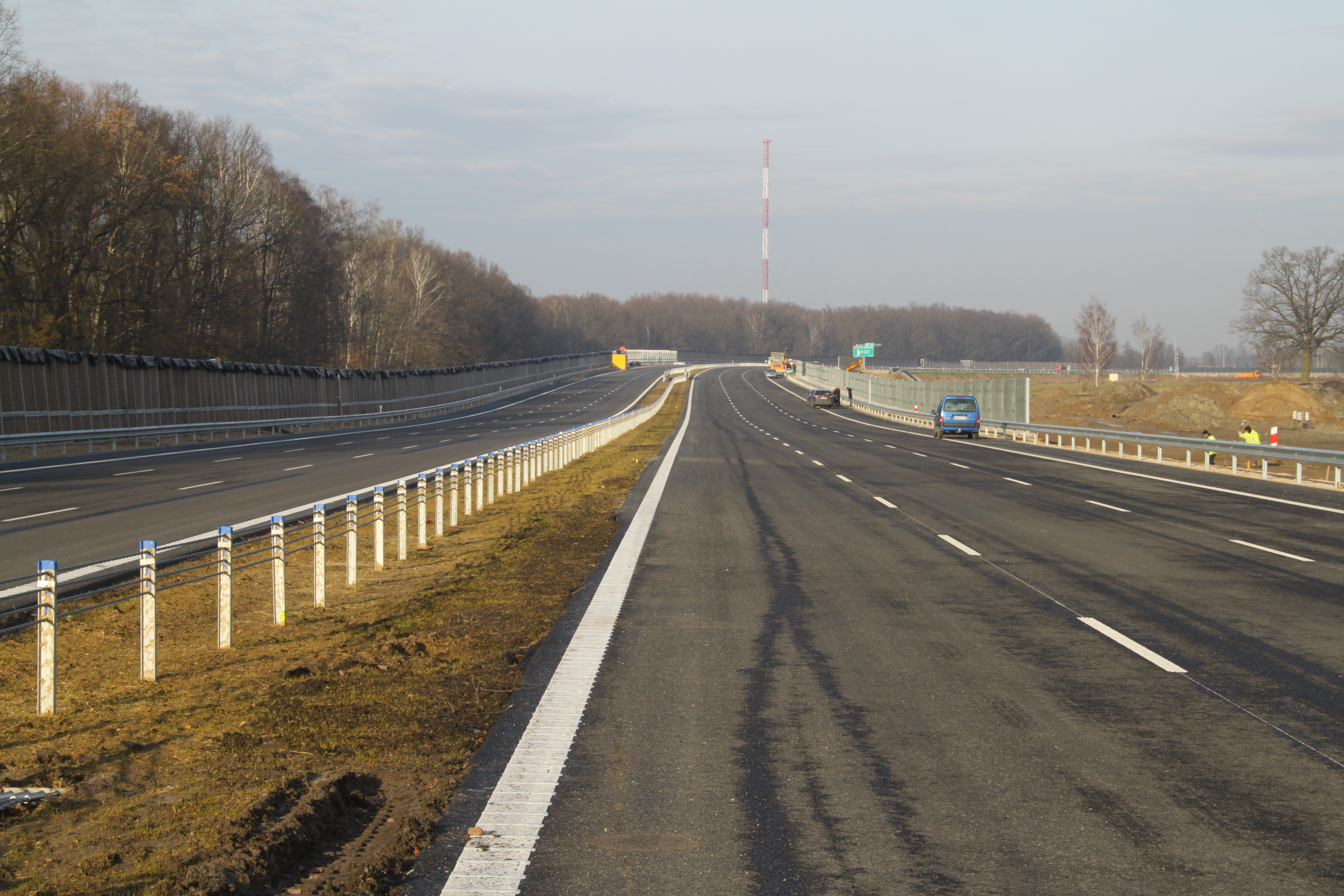 Obwodnica Marek pomiędzy wiaduktem WD-3 a węzłem Kobyłka, na granicy Marek i Kobyłki